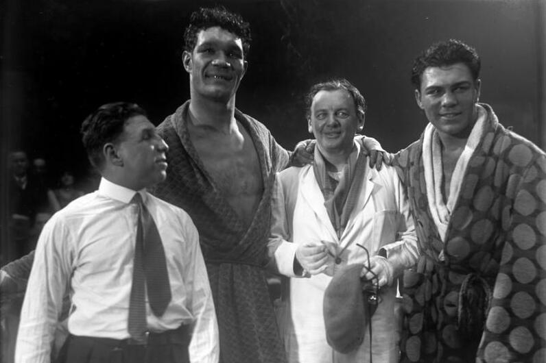 Der deutsche Boxmeister Max Schmeling als Filmstar! Der deutsche Boxmeister Max Schmeling kämpfte mit dem portugisischen Schwergewichtsmeister Jose Santa im Filmring in Berlin-Mariendorf! Der deutsche Box-Schwergewichtsmeister Max Schmeling (rechts) sowie der portugisische Schwergewichtsmeister Jose Santa (links) vor ihrem Boxmatch. In der Mitte der bekannte Berliner Regisseur Reinhold Schünzel, welcher die Filmaufnahmen leitete.